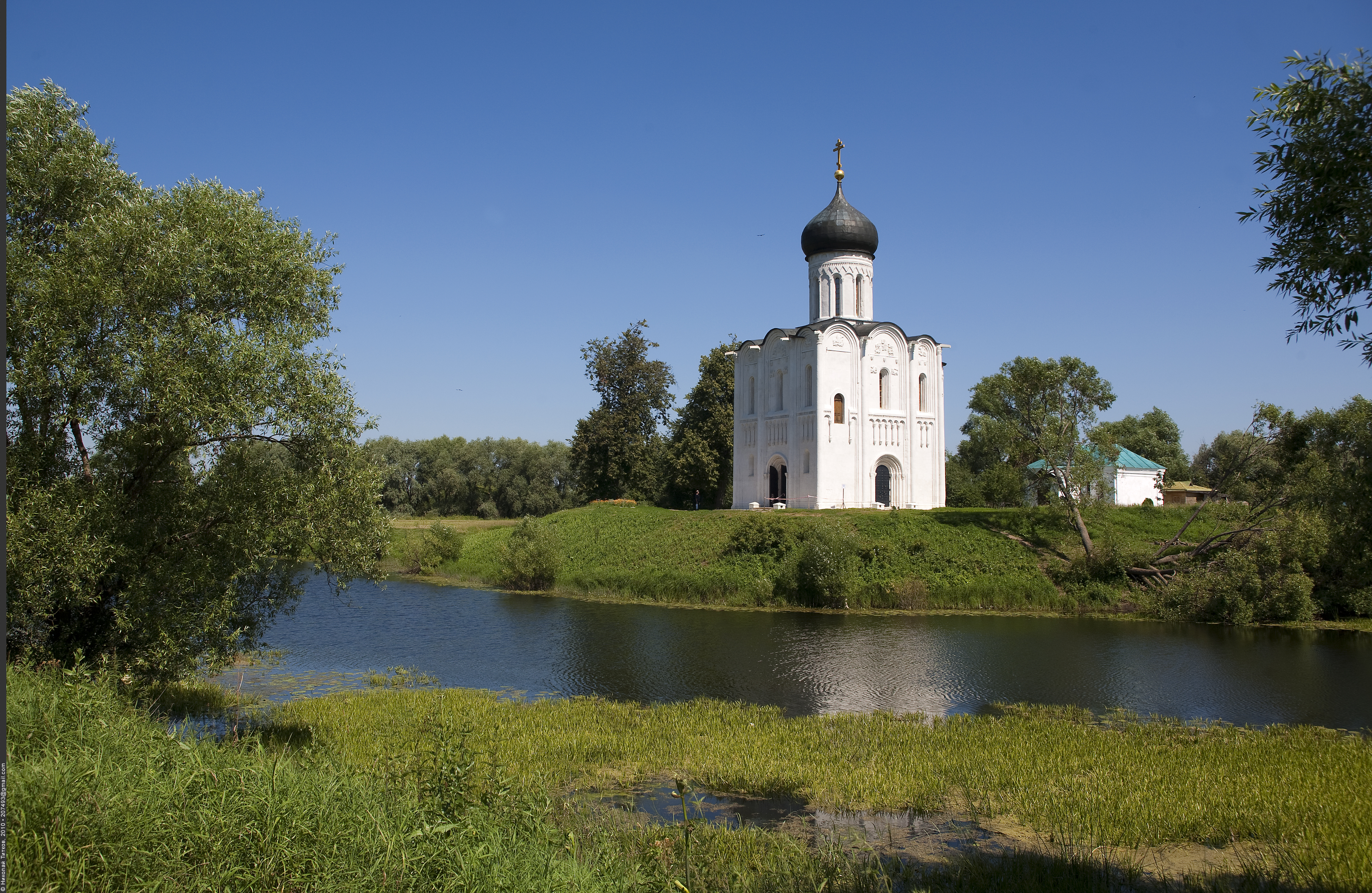 Покров на Нерли — четырёхстолпный, трёхапсидный, одноглавый храм, построенный из белого камня высочайшего качества (кладка весьма однородна, в ней практически отсутствует желтоватый оттенок, пористость блоков очень низка). В сводах для их облегчения применён туфообразный известняк. Храм стоит на уникальном фундаменте, состоящем из восьми рядов качественного гладкотёсаного белого камня (в целом около 4 метров глубиной), базирующихся на обычной для суздальского зодчества бутовой основе, почти квадратной в разрезе (глубиной около 2 метров). Дата постройки — 1165 год — оспаривается многими исследователями.